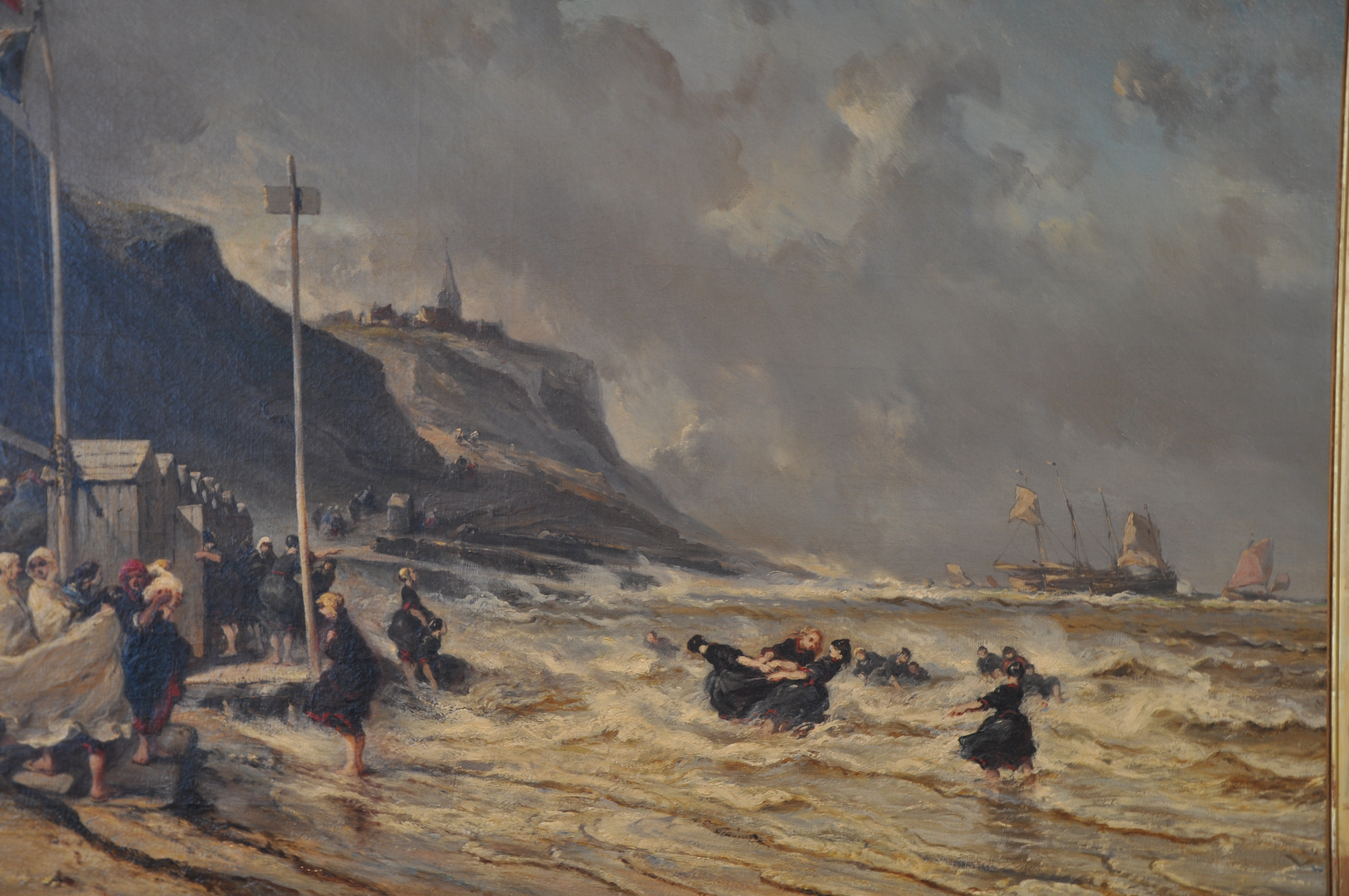 beach in Granville (France, Normandy)label QS:Len,"beach in Granville (France, Normandy)" label QS:Lfr,"La Plage de Granville, tableau d'Eugène Isabey, 1863"